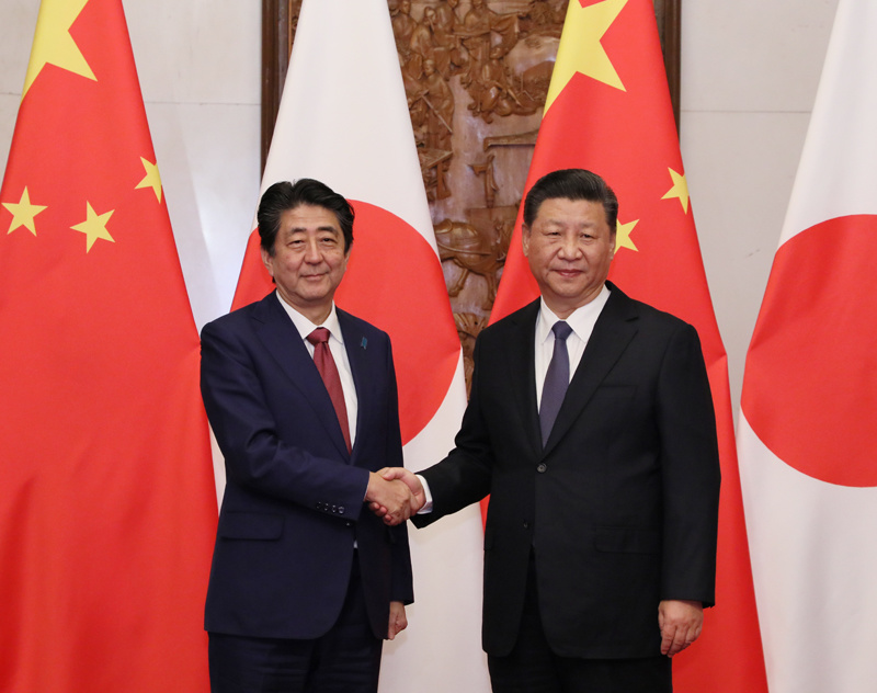 中華人民共和國國家主席習近平與日本首相安倍晉三握手